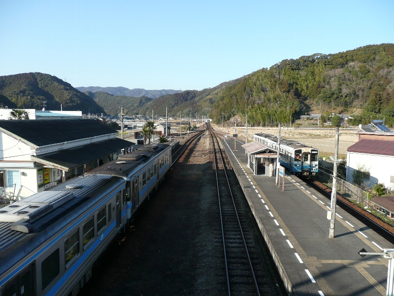 Nishi-Sakawa station